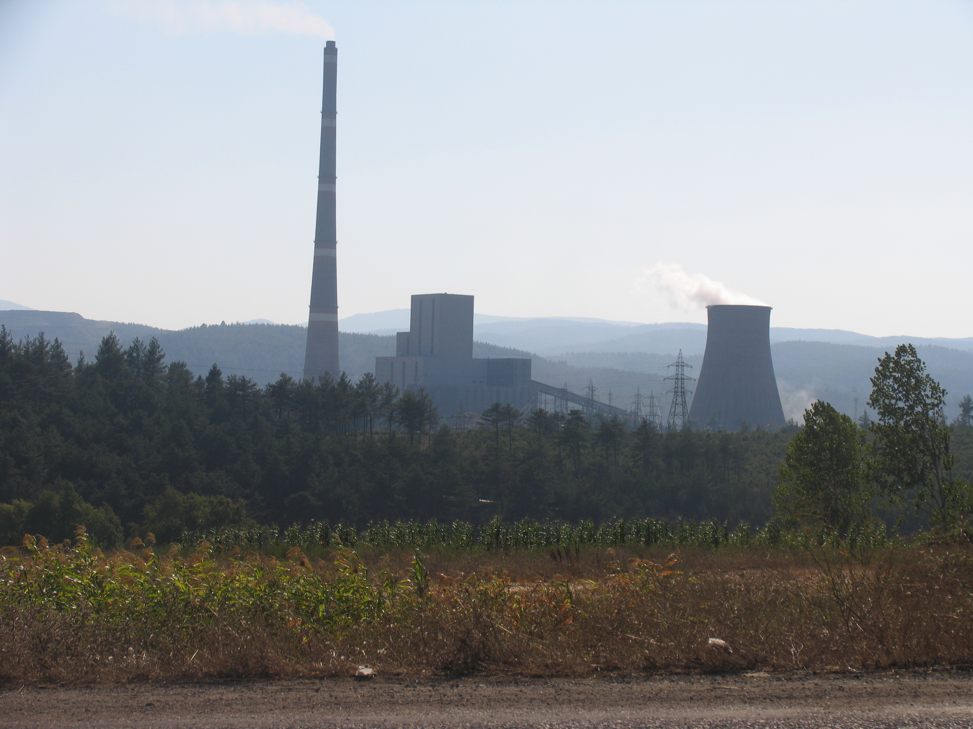 orhaneli termik santral